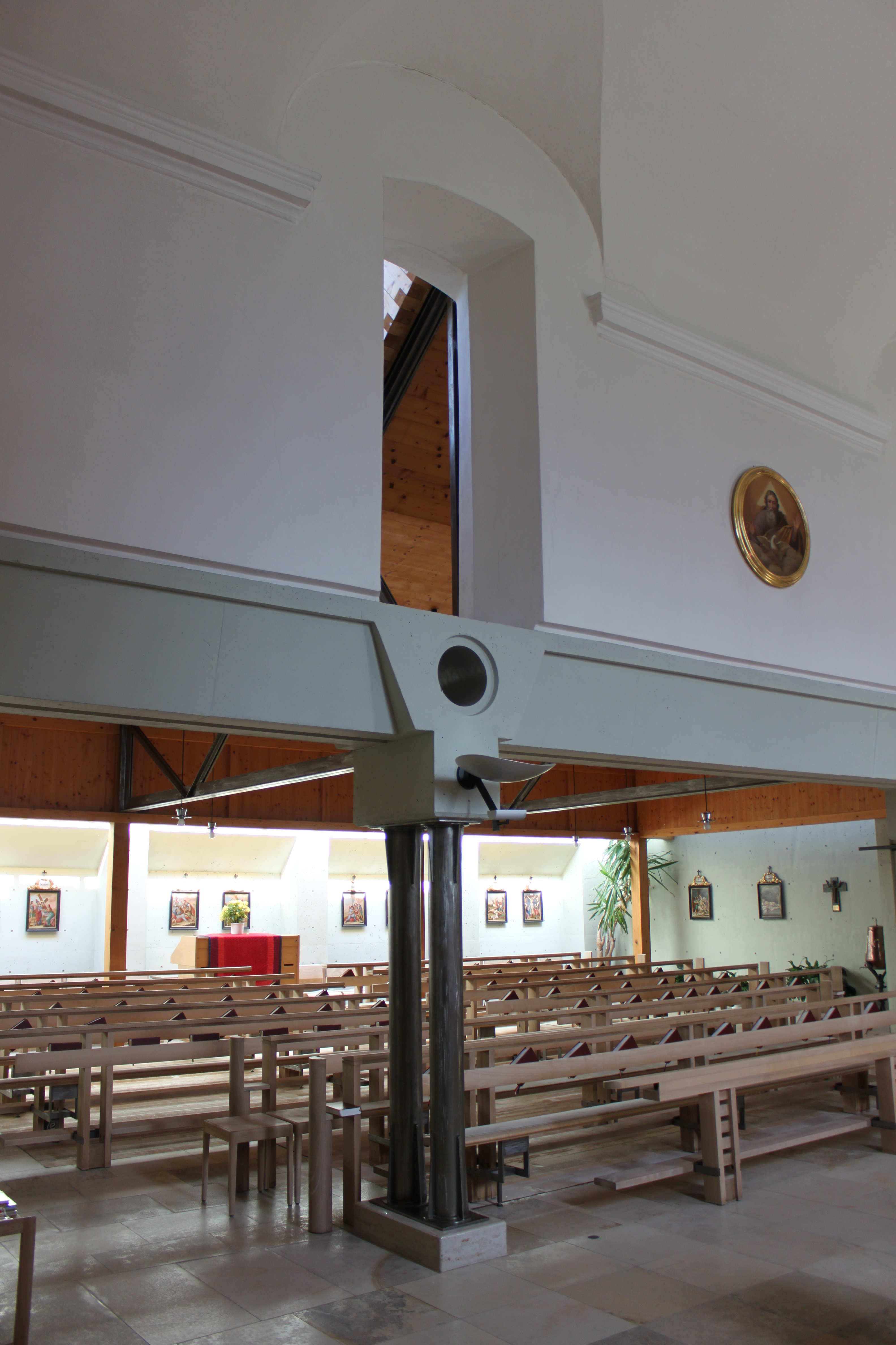 Kath. Pfarrkirche hl. Antonius Eremit mit Friedhof